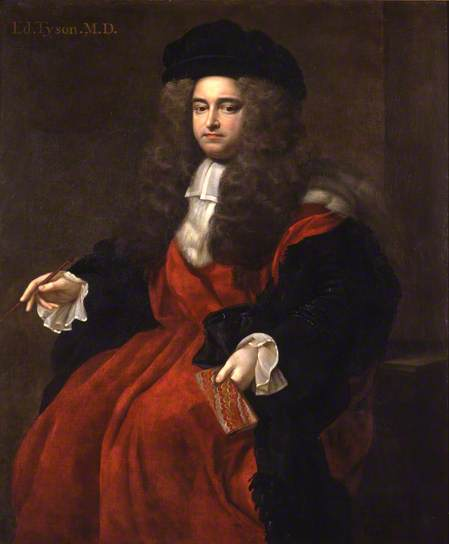 Edward Tyson (1650–1708)